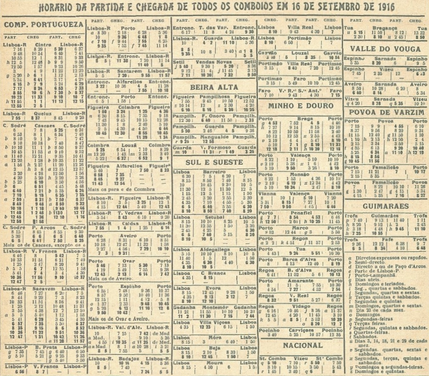 Tabela com todos os horários dos comboios de passageiros em Portugal, em Setembro de 1916. Esta imagem foi publicada na Gazeta dos Caminhos de Ferro n.º 690, de 16 de Setembro de 1916, e digitalizada pela Hemeroteca Municipal de Lisboa.